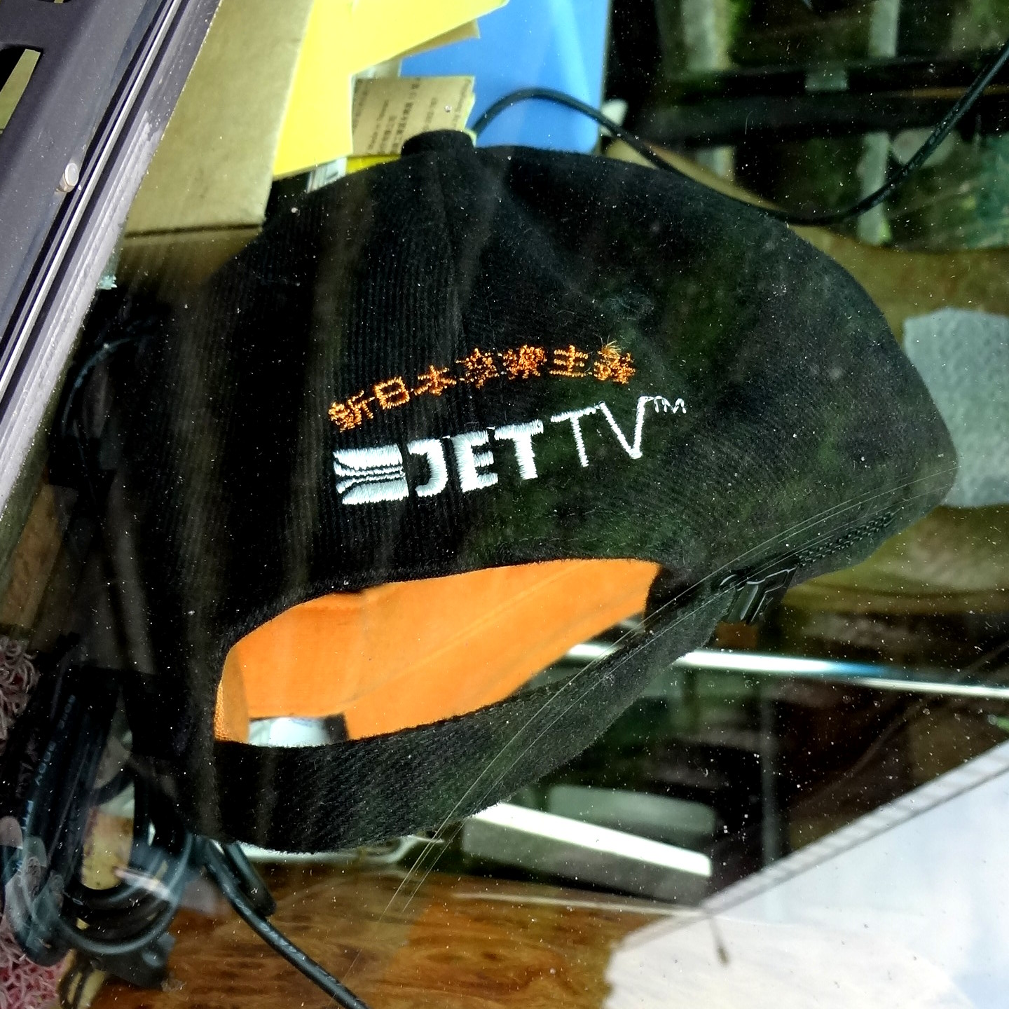 JET TV黑色鴨舌帽背面，繡橘色「新日本享樂主義」七字與白色JET TV標誌。